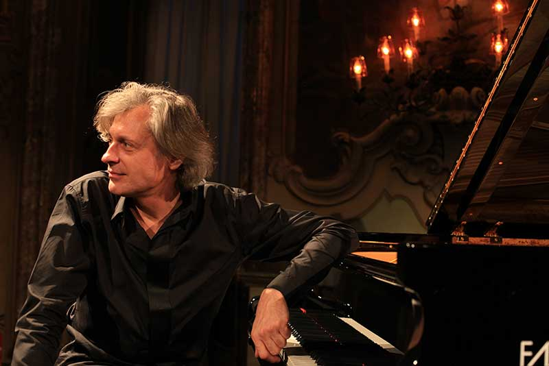 Dimitri Naïdtch, Milan, 05/02/2014